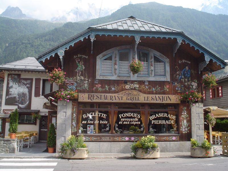 La façade traditionnelle d'un restaurant chamoniard.